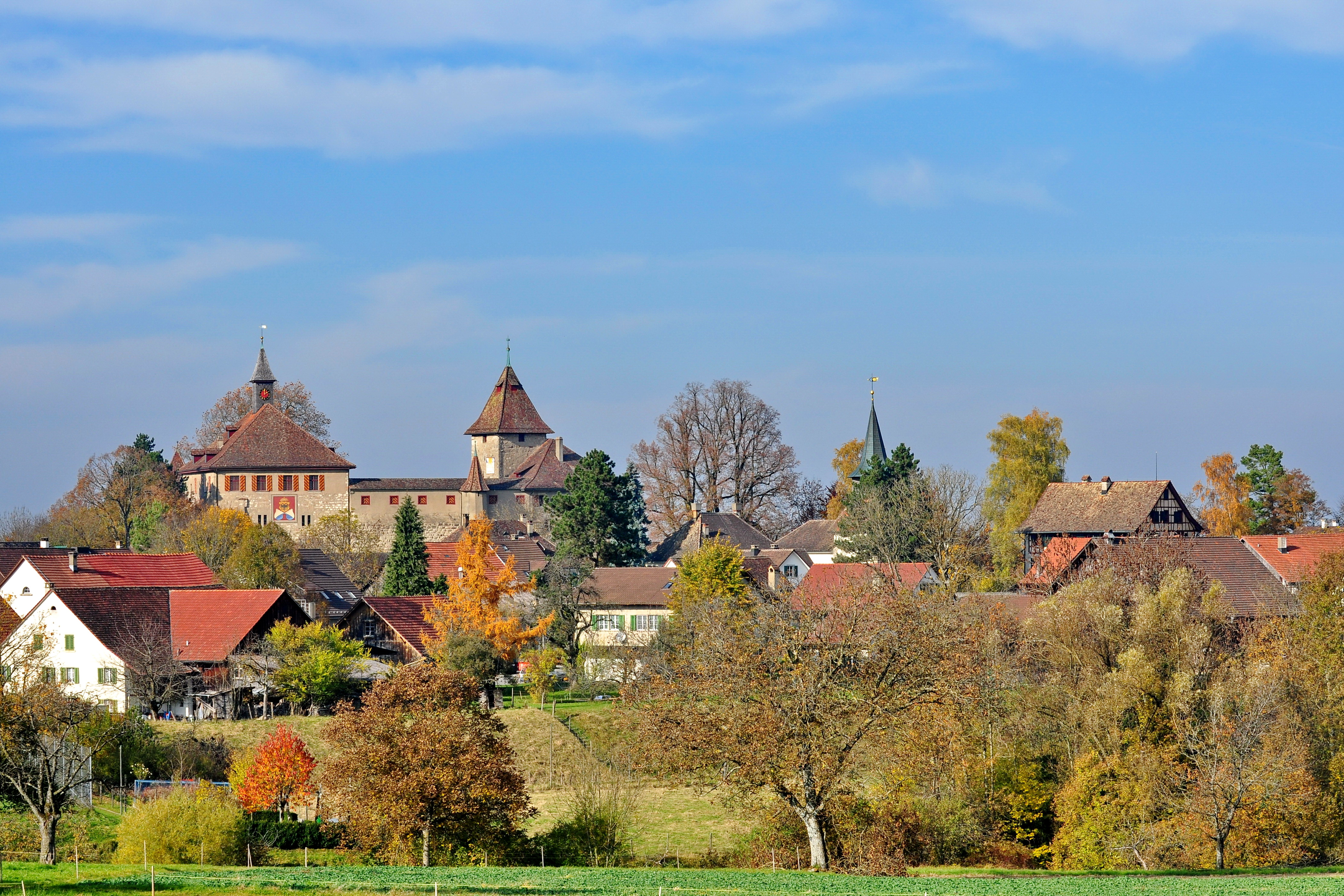 Schloss Kyburg in Kyburg (Switzerland)